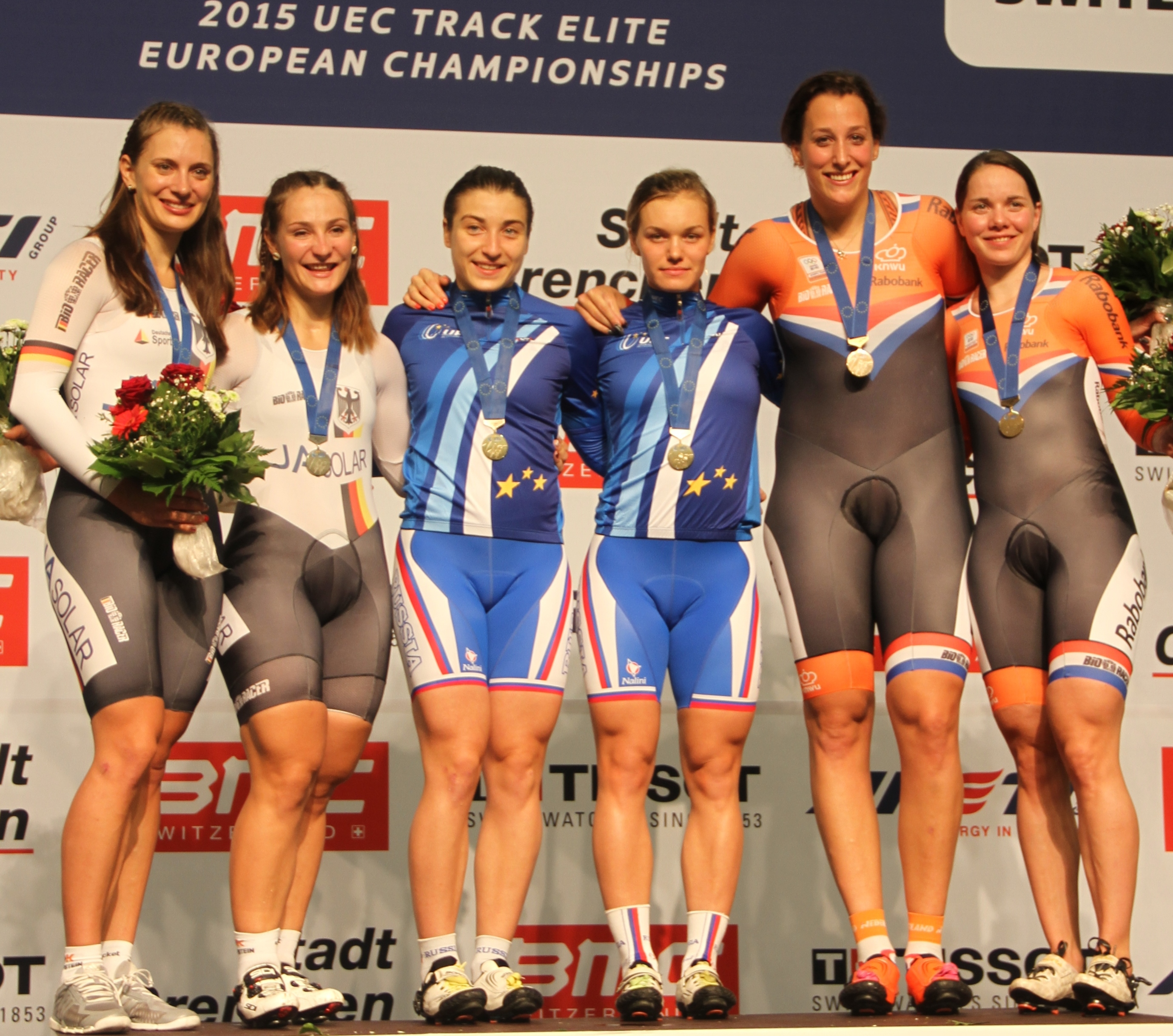 Podium Teamsprint der Frauen (v.l.n.r.): Miriam Welte, Kristina Vogel, Daria Shmeleva, Anastasiia Voynova, Elis Ligtlee, Laurine van Riessen The making of this document was supported by the Community-Budget of Wikimedia Germany.